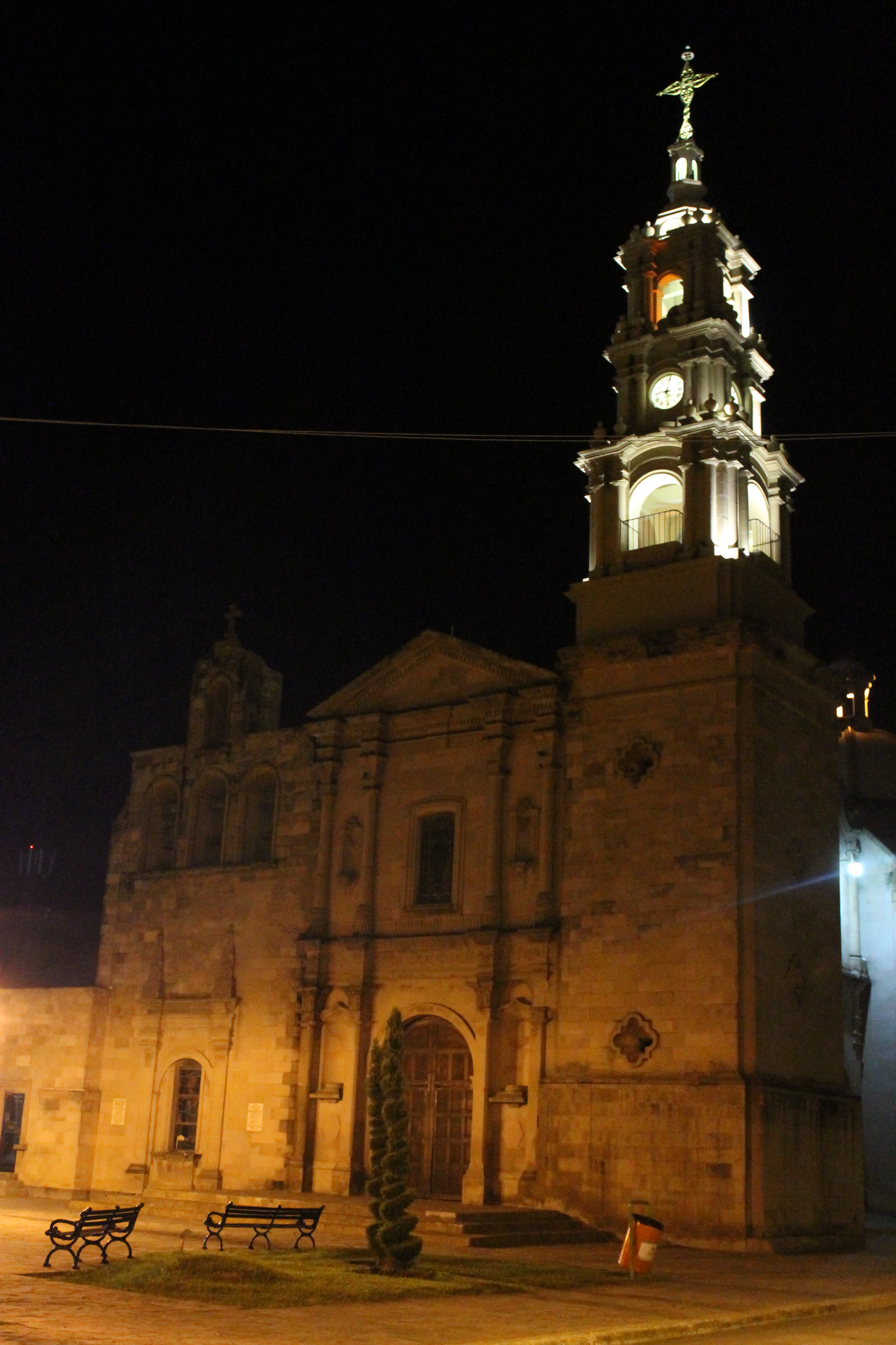 Esta es la Catedral de Linares Nuevo León, México